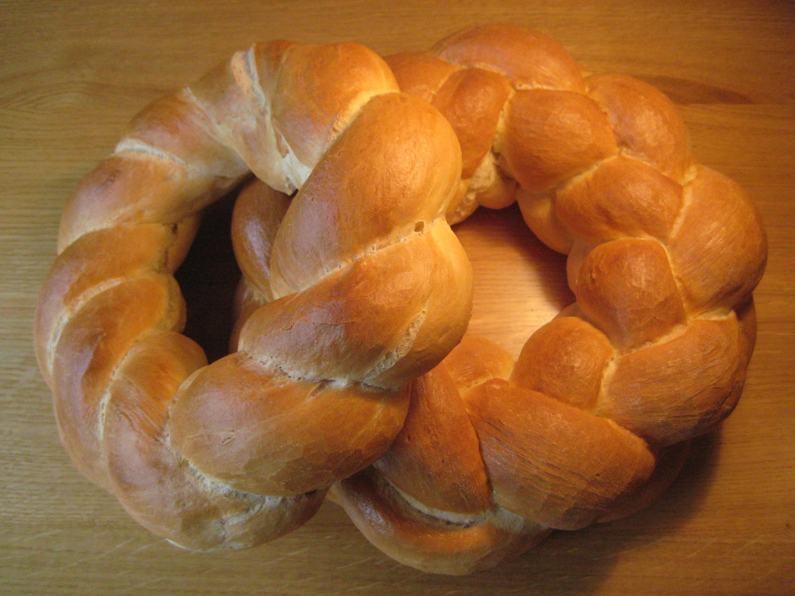 Vrtanek, slovenian (region Prekmurje) type of bread